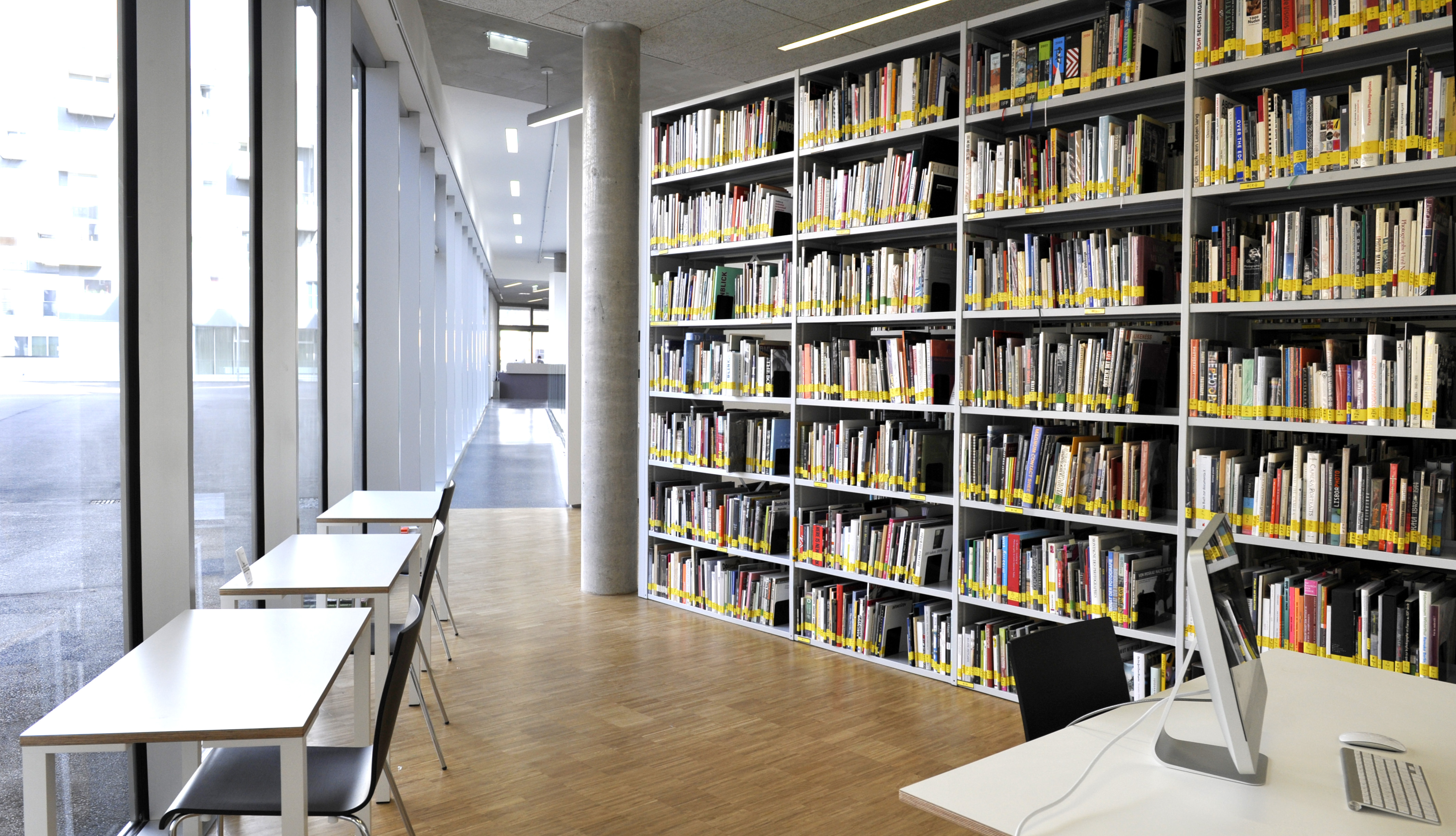 Interior view of the Fotohof library